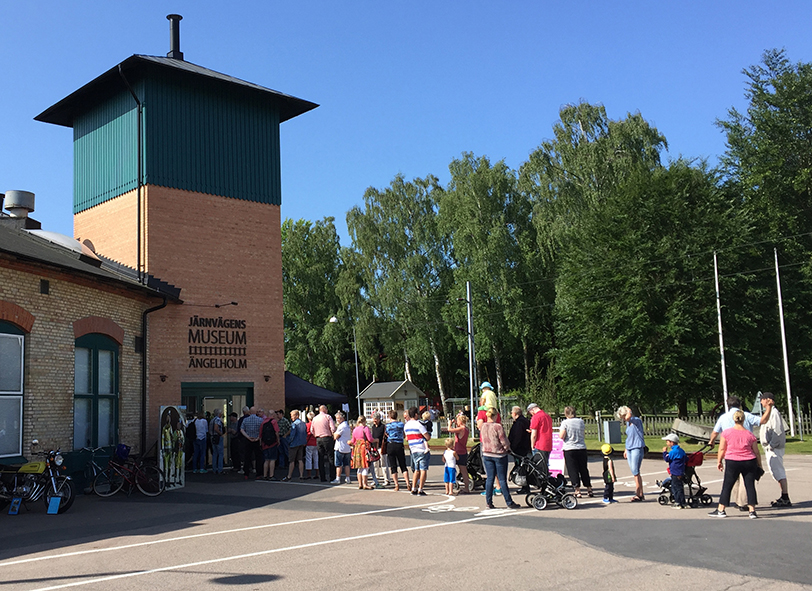 Entré Järnvägens Museum